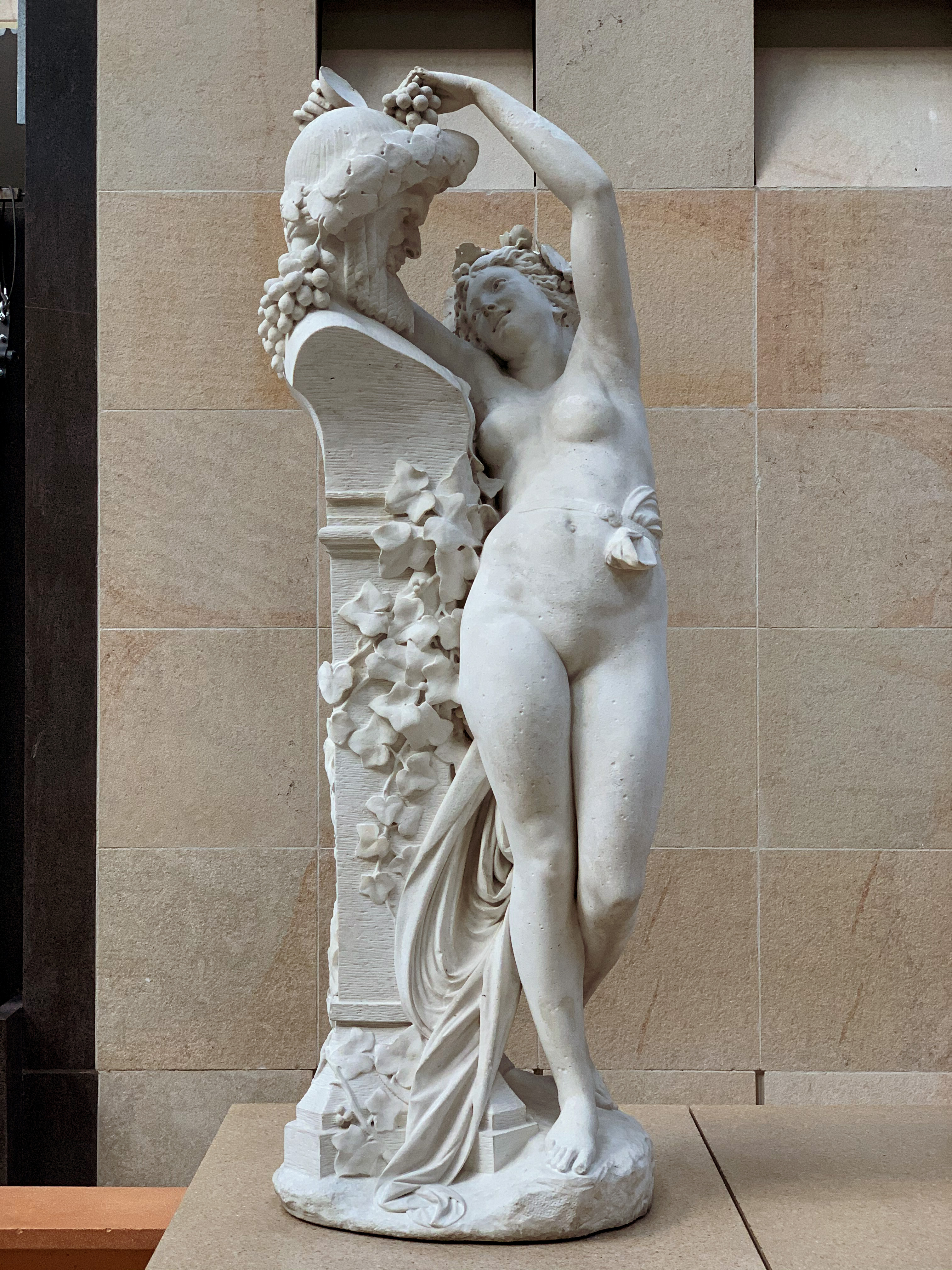 La Bacchante, marbre de Carrier-Belleuse exposé au Salon de 1863. Cette oeuvre est conservée à Paris, au musée d'Orsay.